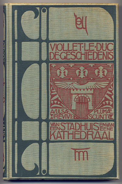 Boekomslag: De geschiedenis van een stadhuis en van eene kathedraal. 1e druk 1897. Auteur: Viollet-le-Duc (vertaling: Th. Molkenboer). Bandontwerp: Theo Molkenboer. Uitgeverij: F. Bohn